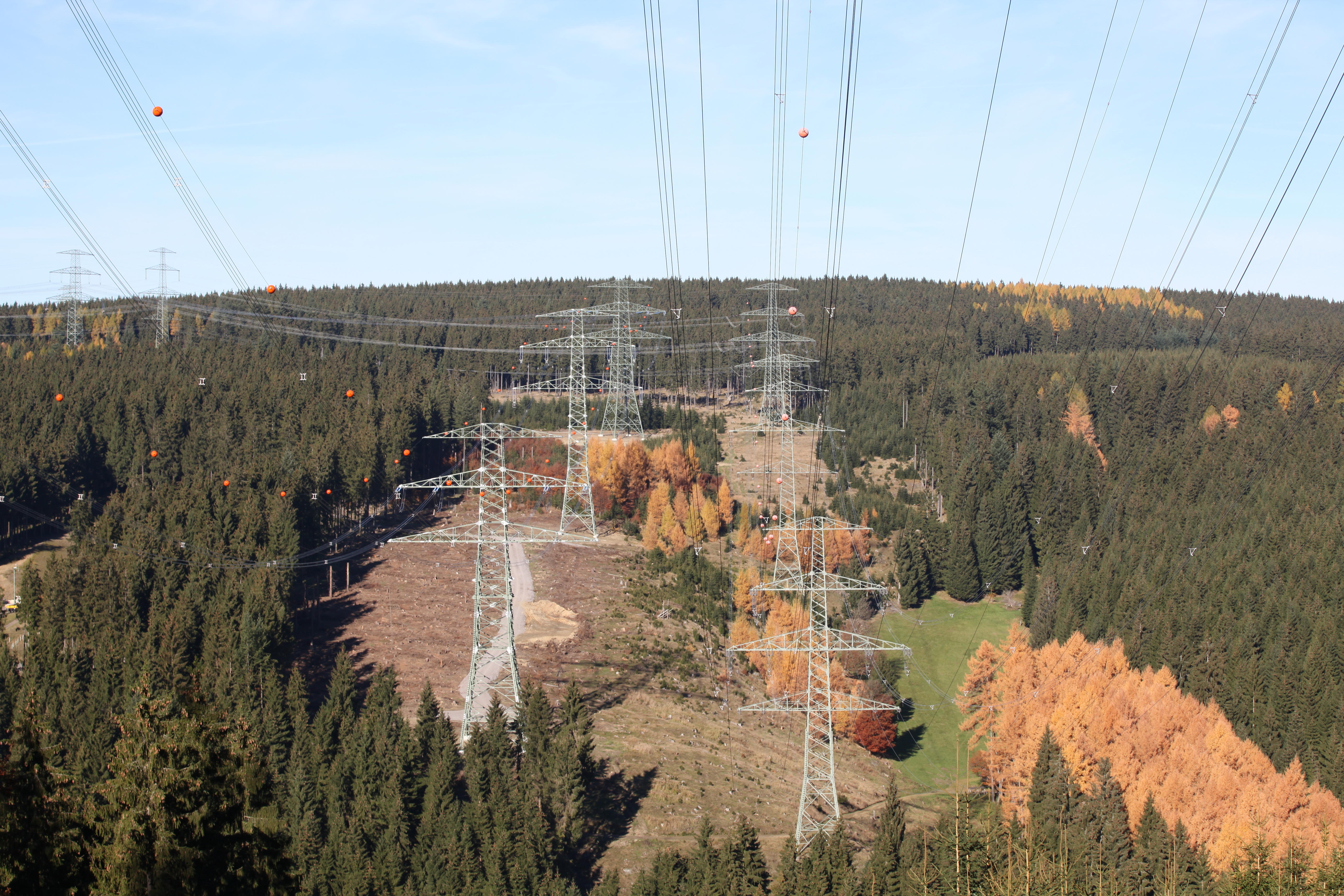 links Thüringer Strombrücke, rechts 380-kV-Leitung vom Pumpspeicherwerk Goldisthal zum Umspannwerk Altenfeld, bei Altenfeld